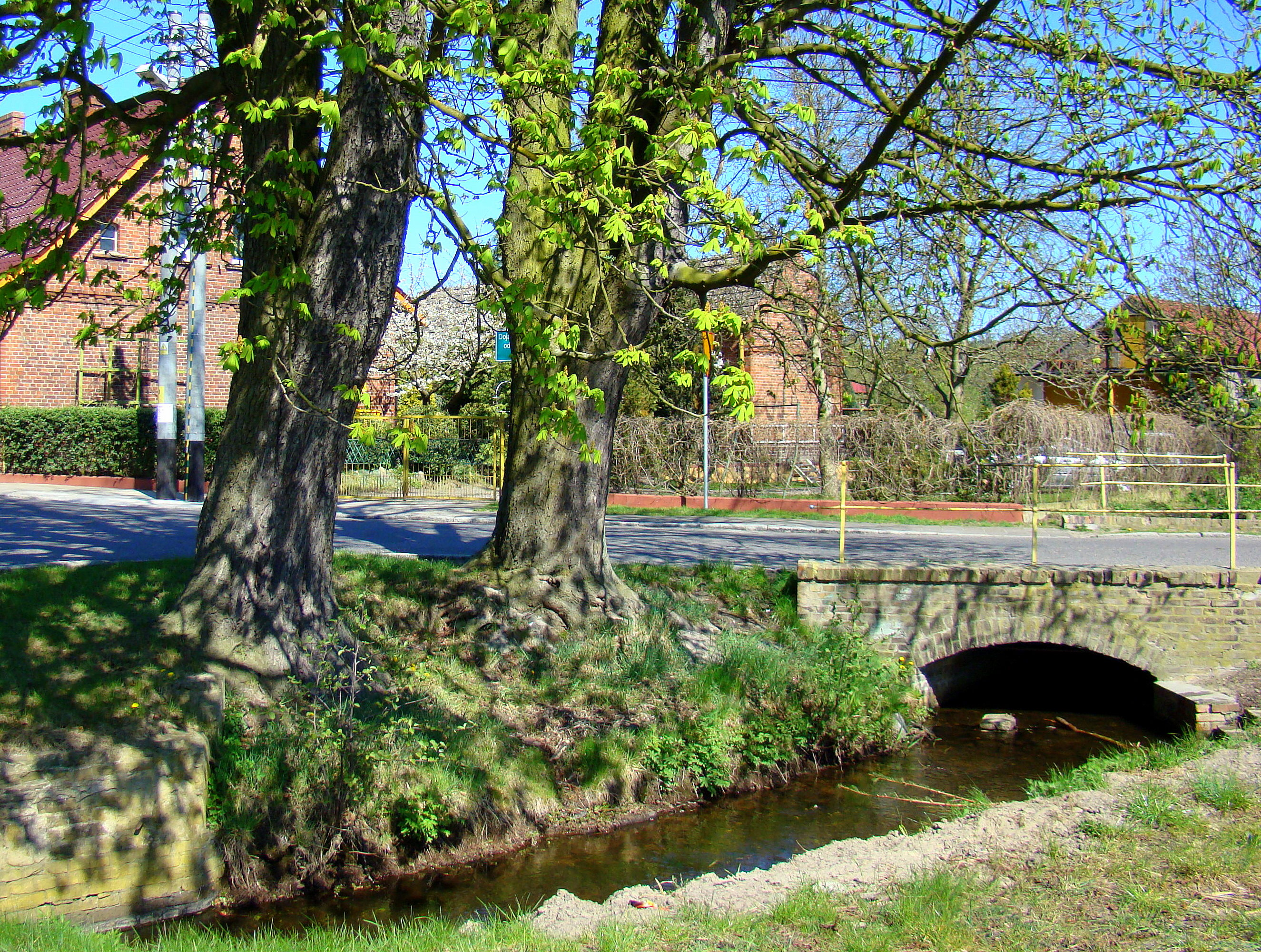 Rzeka Karpina w Uniemyślu, (Gmina Police, Województwo zachodniopomorskie), Polska